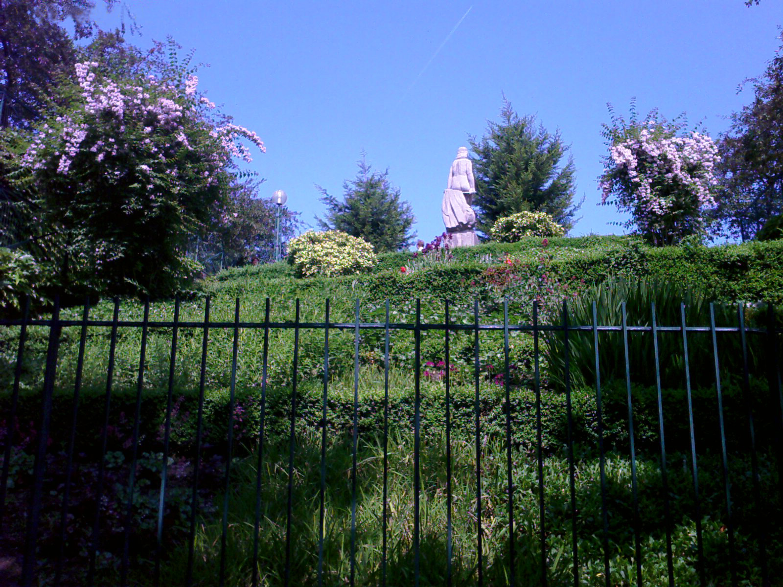 Jardin de reuilly 01-05-2007 vu du bd Dausmesnil